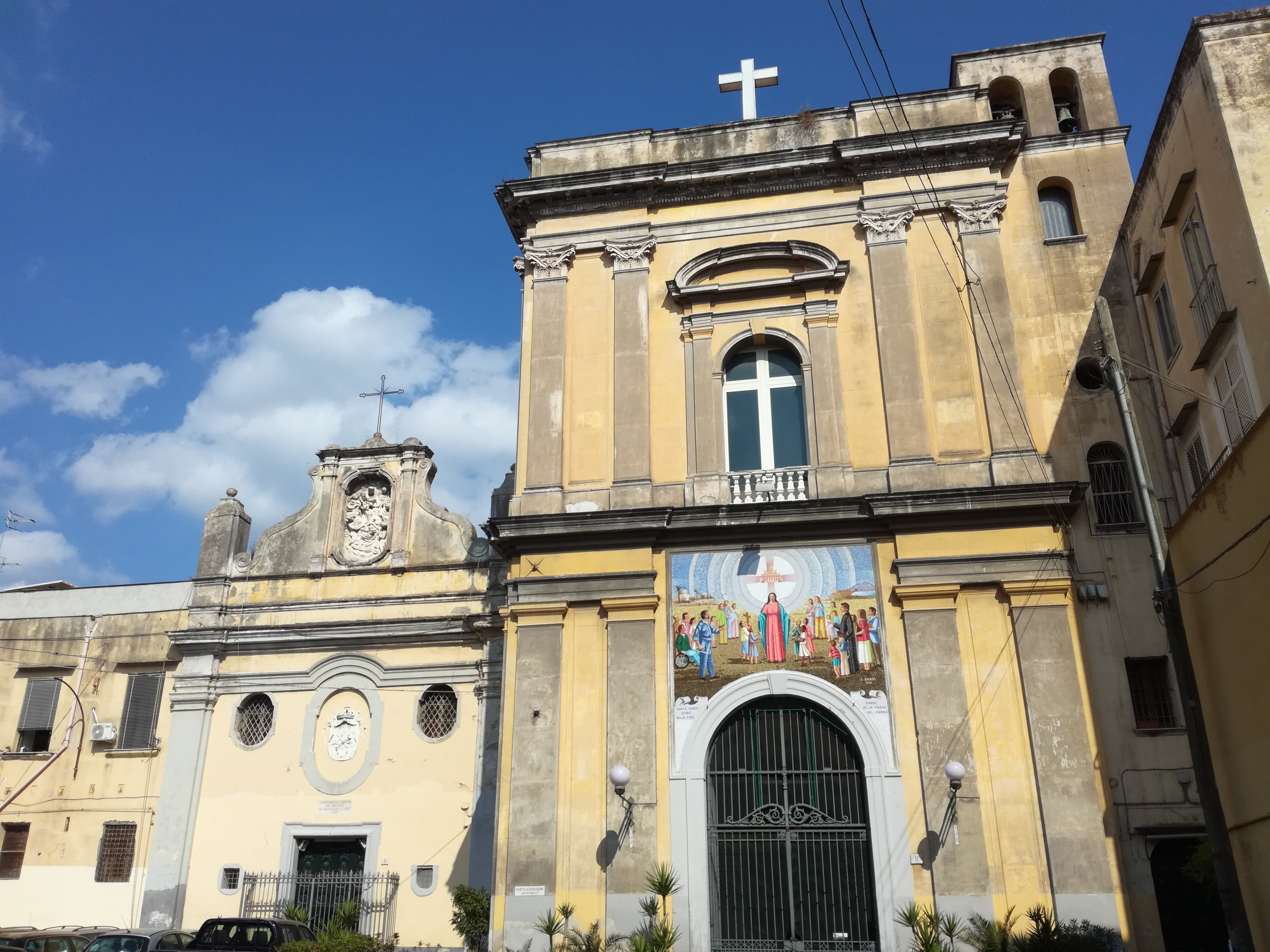 Chiesa di Santa Maria della Fede (Napoli)